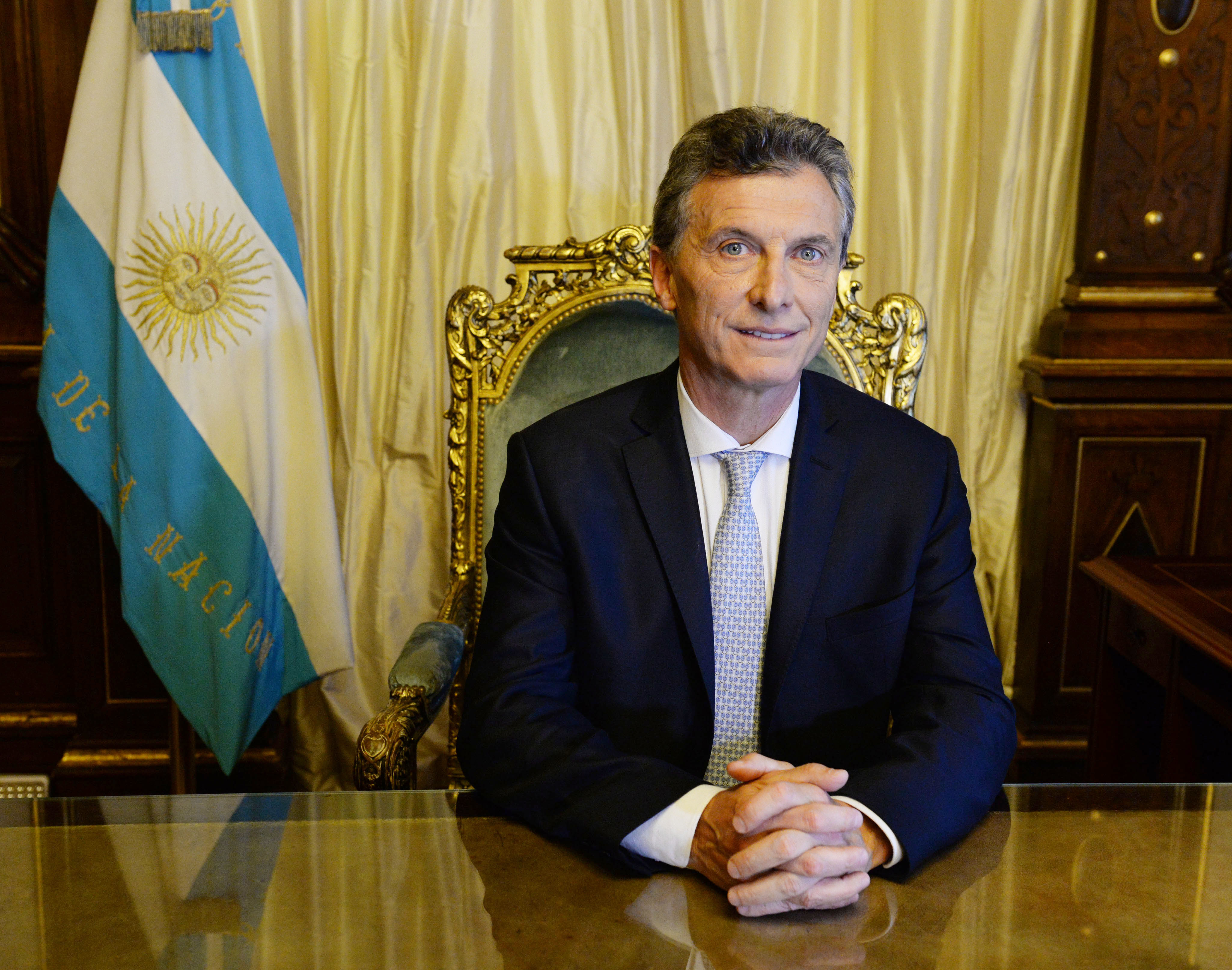 Retrato Oficial del presidente Mauricio Macri, en el Sillón de Rivadavia.